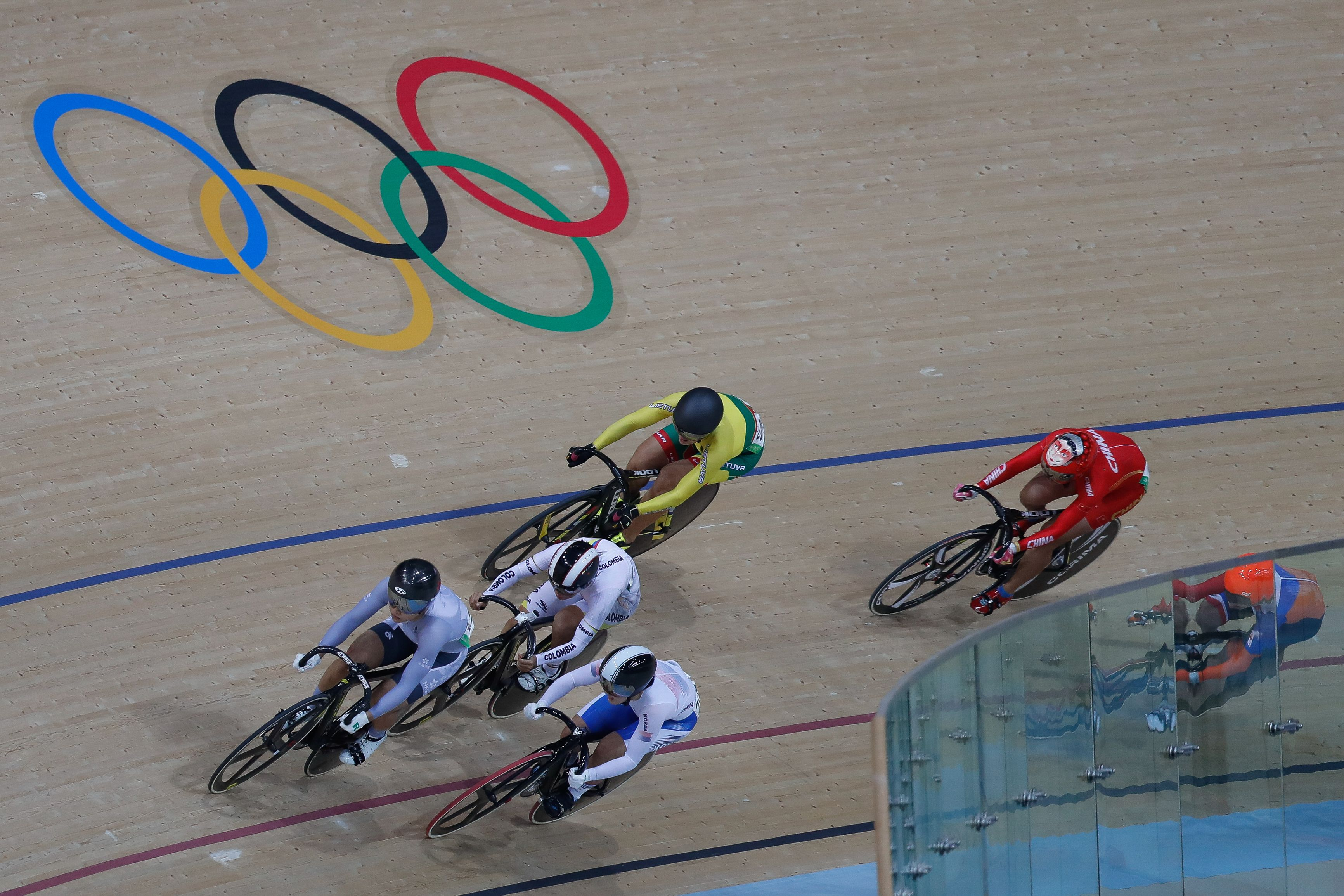 Rio de Janeiro - Bateria da sefunda fase da corrida Keirin de ciclismo no VelГіdromo dos Jogos Rio 2016, no Parque OlГ­mpico. (Fernando FrazГЈo/AgГЄncia Brasil)